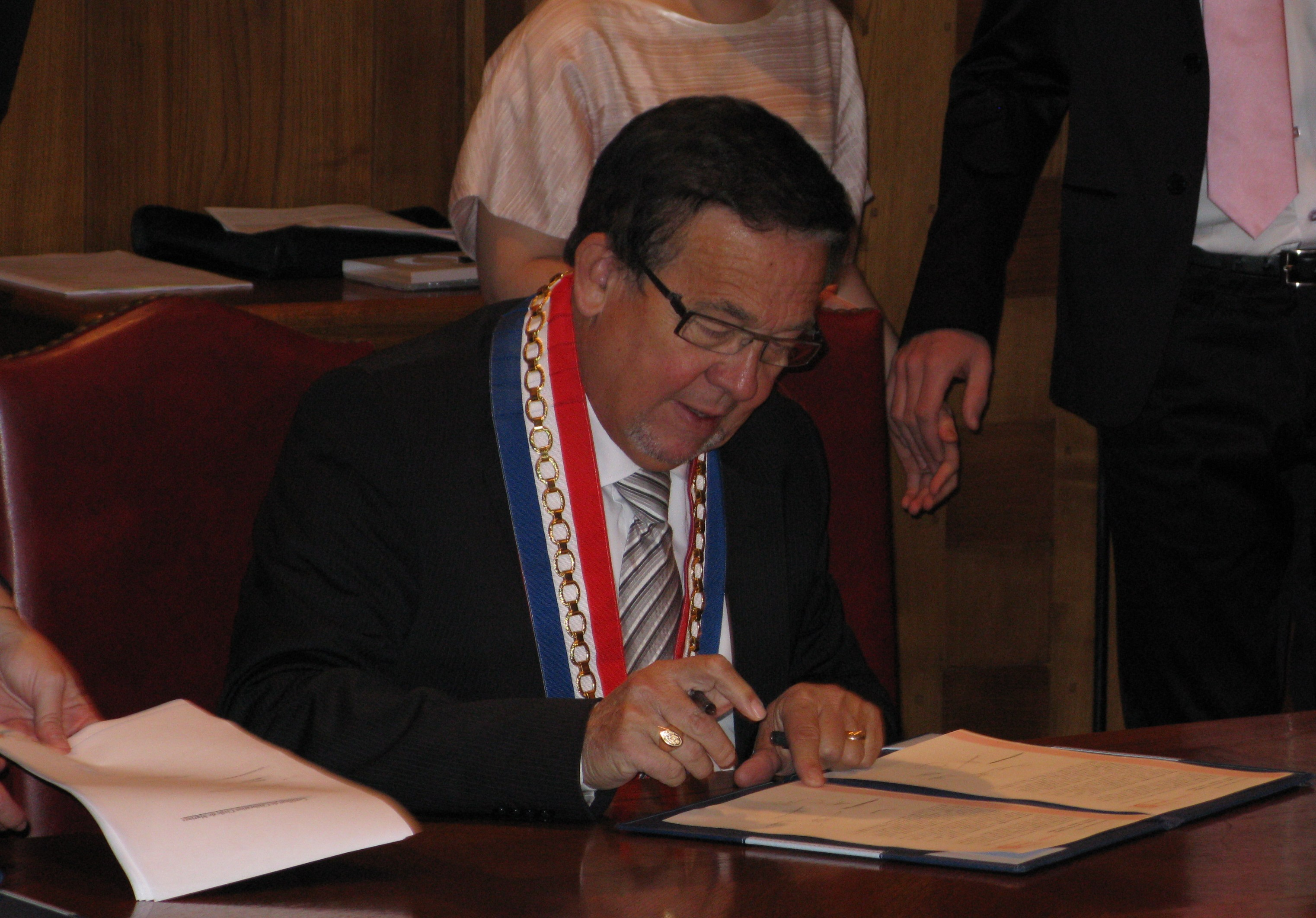 Michel Angot en novembre 2010